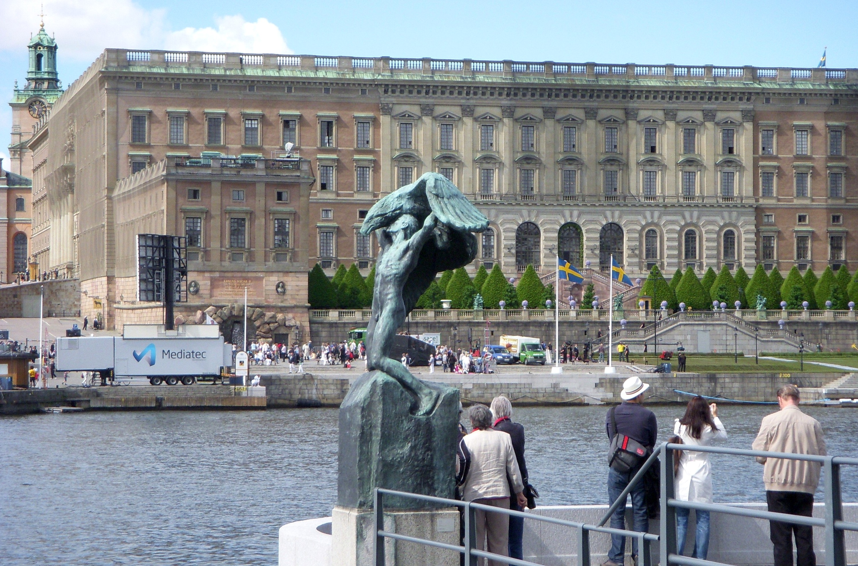 Carl Milles skulptur "Vingarana" på Strömkajen i Stockholm